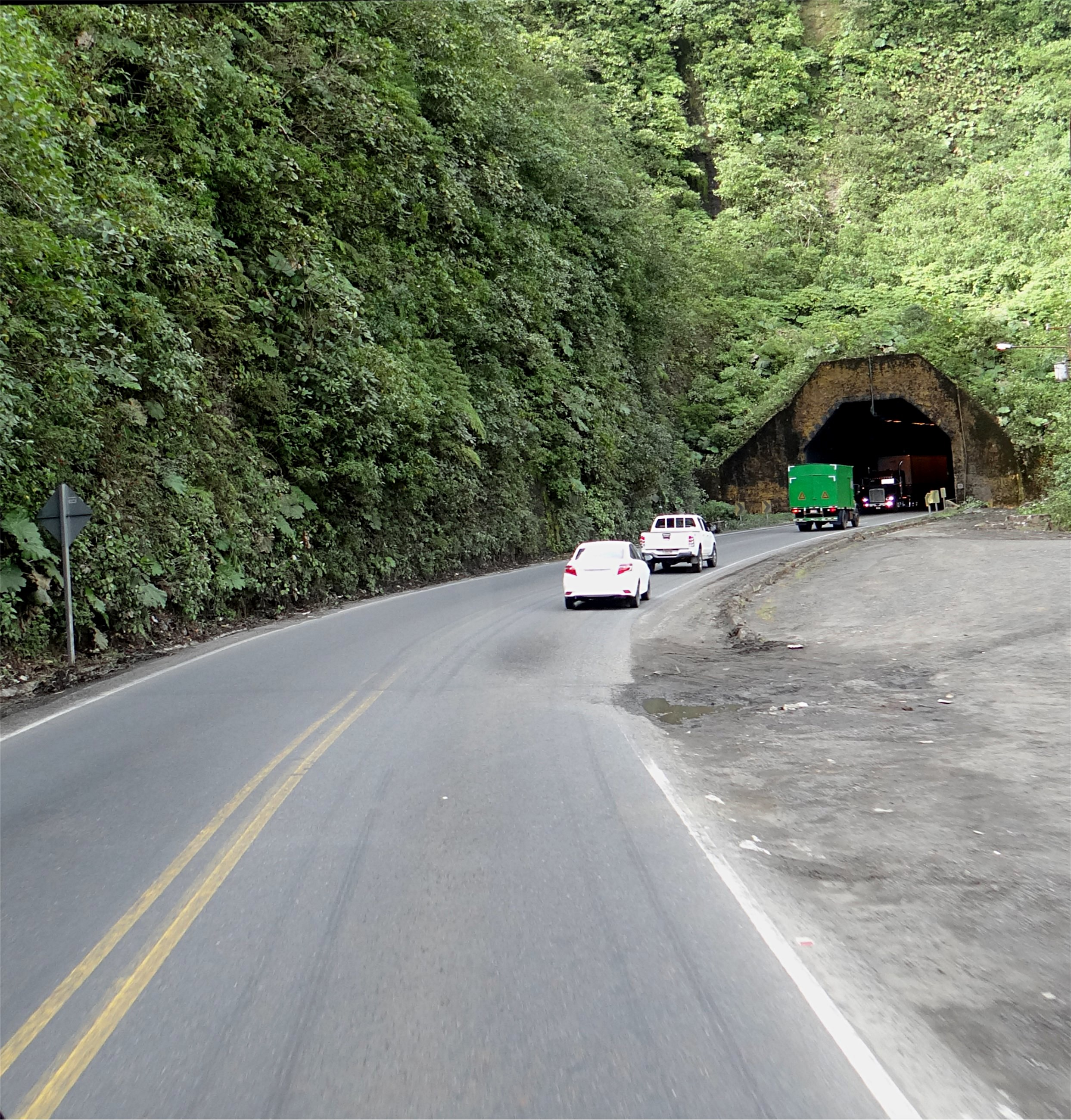 Entrée du tunnel routier Zurqui (coté San José) sur la route 32 dans le Parc national Braulio Carrillo, Costa Rica.